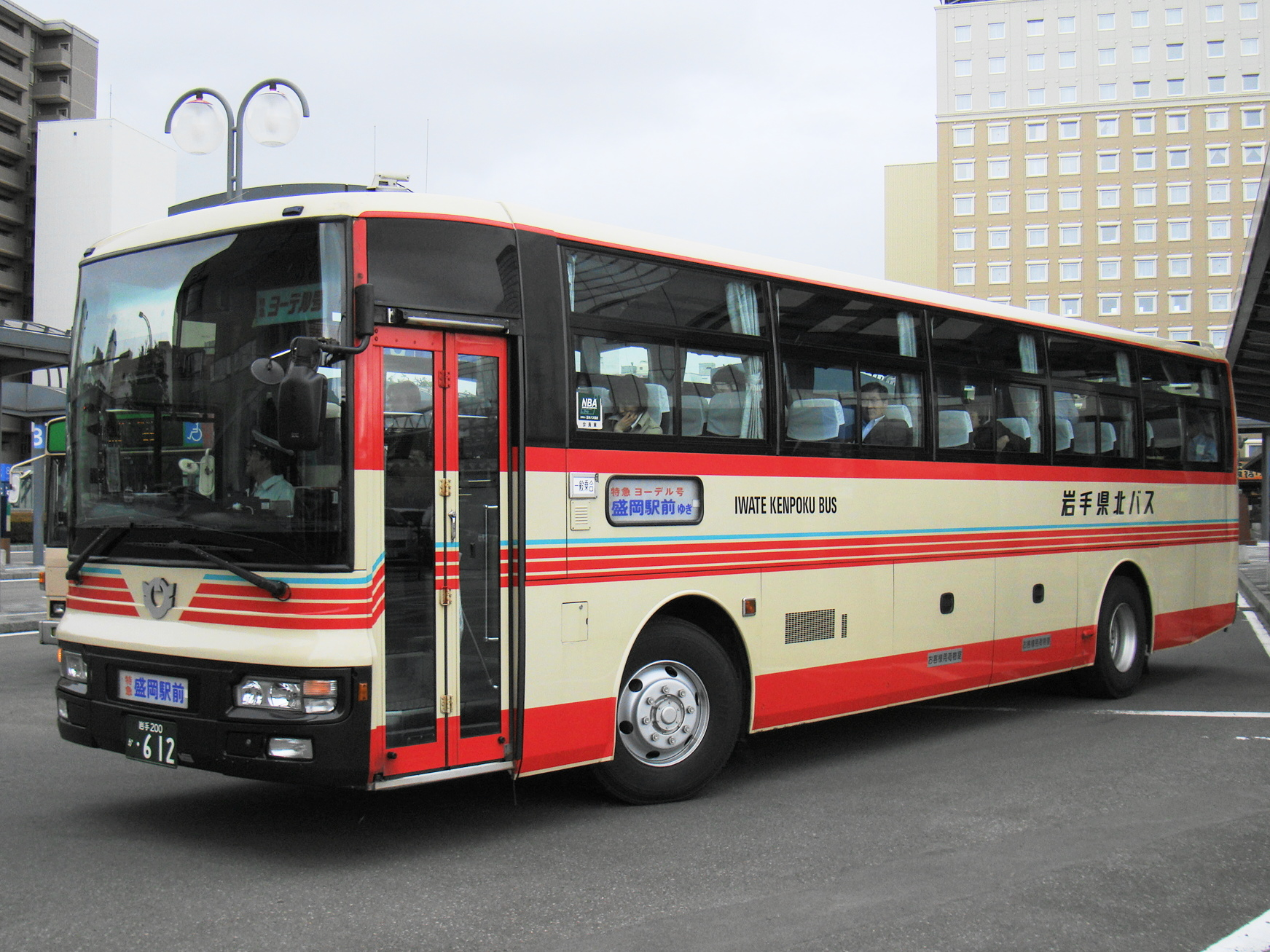 "Jodel gō" Hirosaki to Morioka